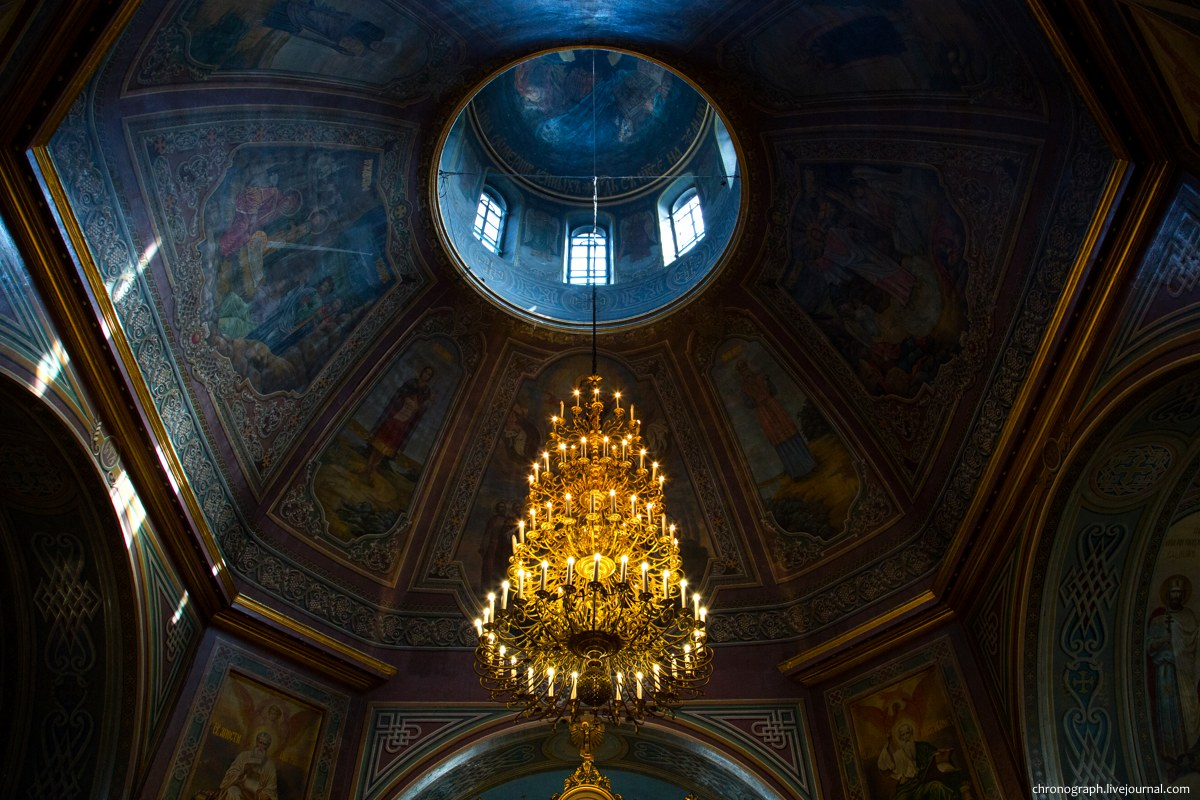 Роспись купола и люстра Вознесенского храма. Вознесенский Сызранский мужской монастырь